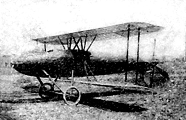 Kpi-5-torpeda